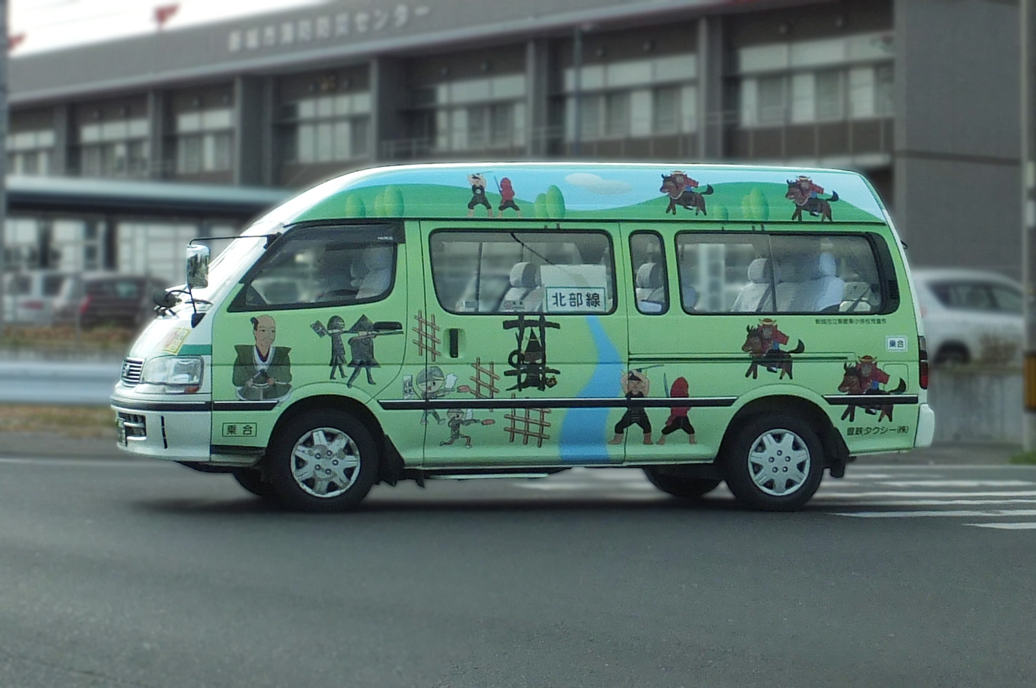 新城市コミュニティバス。